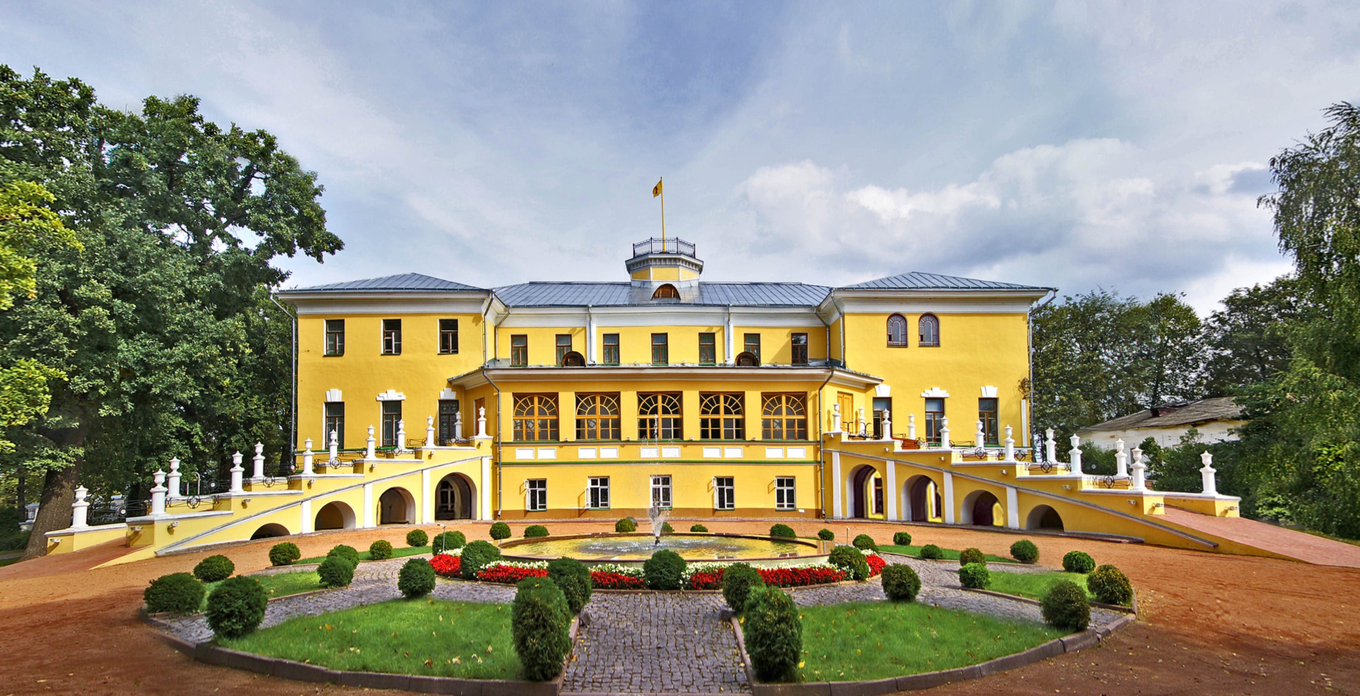 Главное здание Ярославского художественного музея